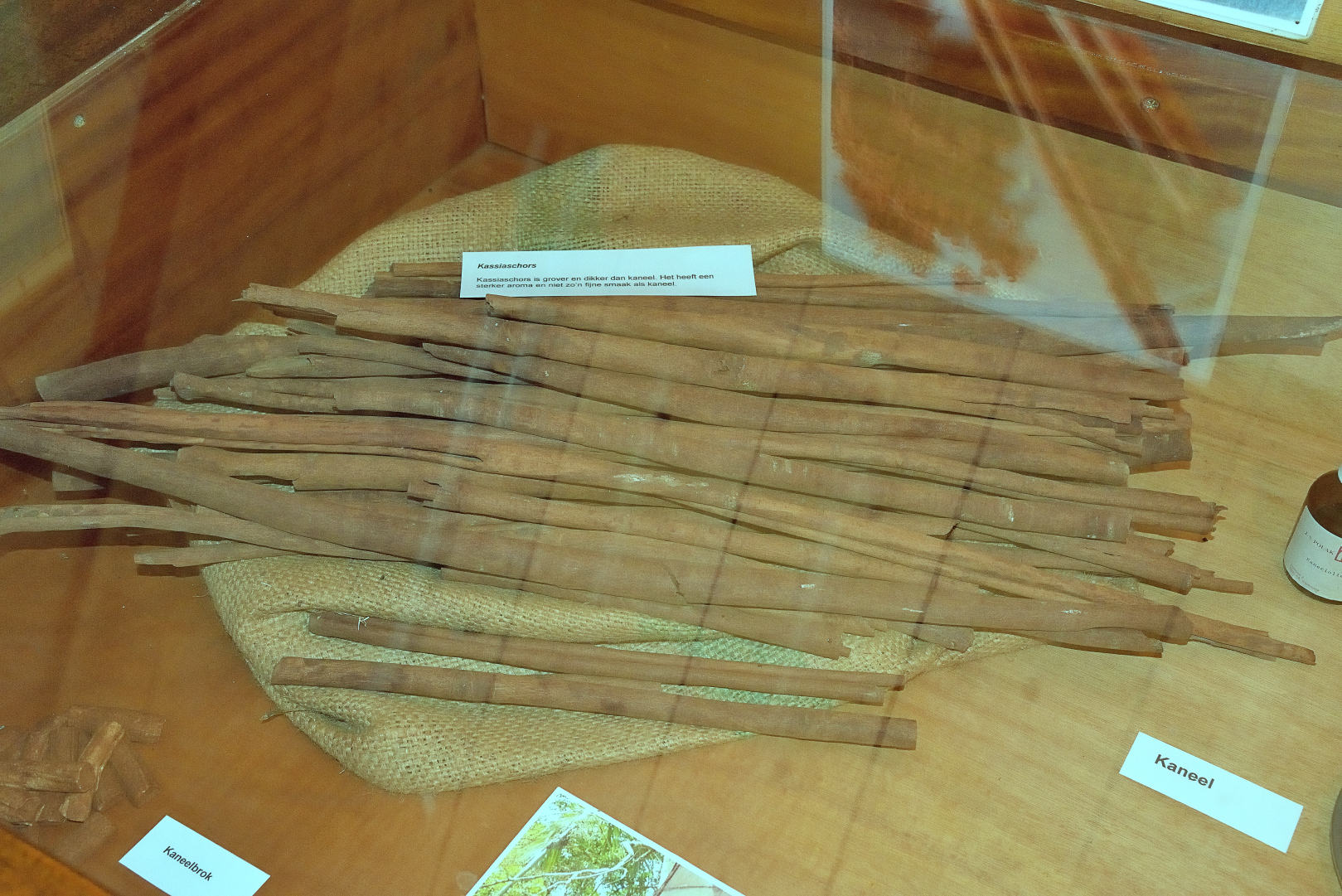 De Wachter, Zuidlaren, cassia 'kaneel'